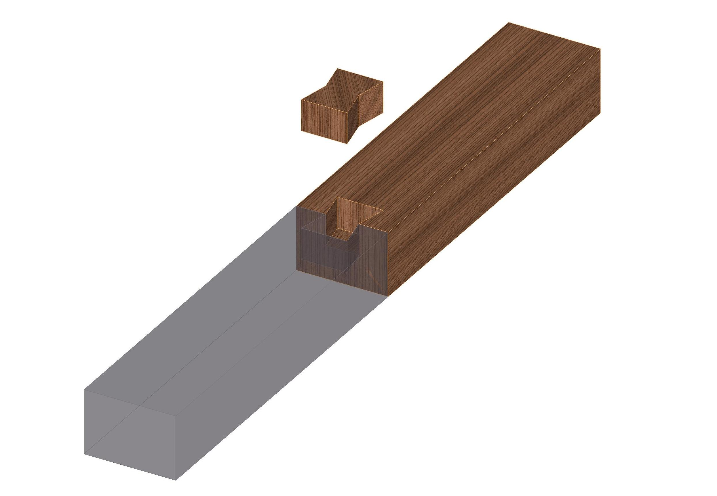 Holz-Stoss-Längsverbindungen hier Stumpfer Stoss mit eingesetztem Schwalbenschwanz auf halbe Dicke Holzverbindung.